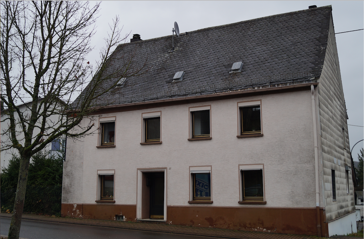 Ludemsbauer heute